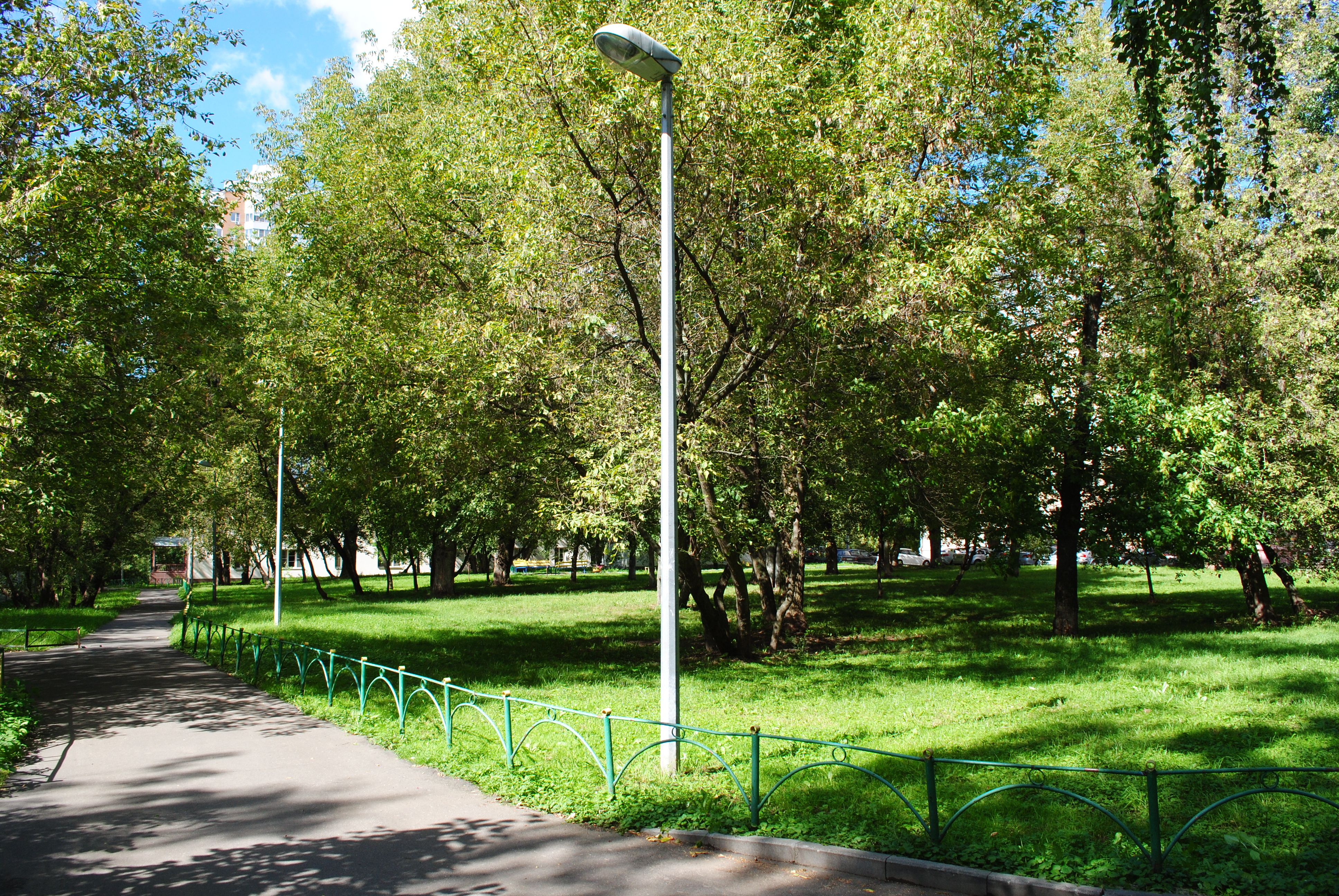 Сквер, прерывающий трассу 2-го Мосфильмовского переулка